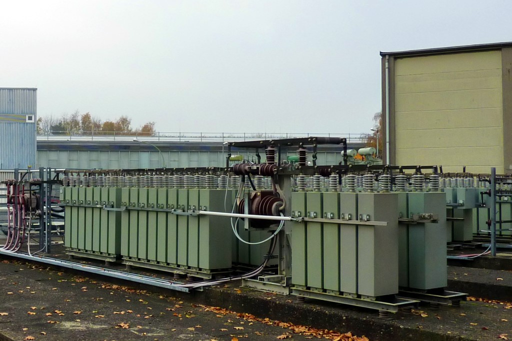 Eine von mehreren Batterien von Folienkondensatoren zur Erzeugung des Magnetfeldes für den Ringbeschleuniger HERA auf dem Gelände des DESY in Hamburg